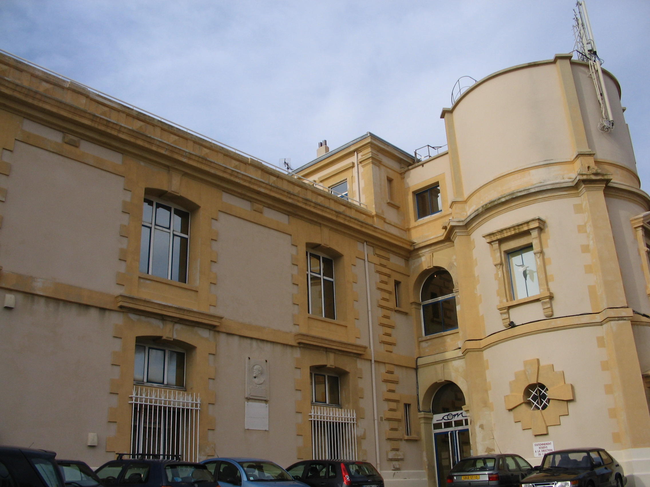 Station Marine d'Endoume, siège du Centre d'Océanologie de Marseille (COM)